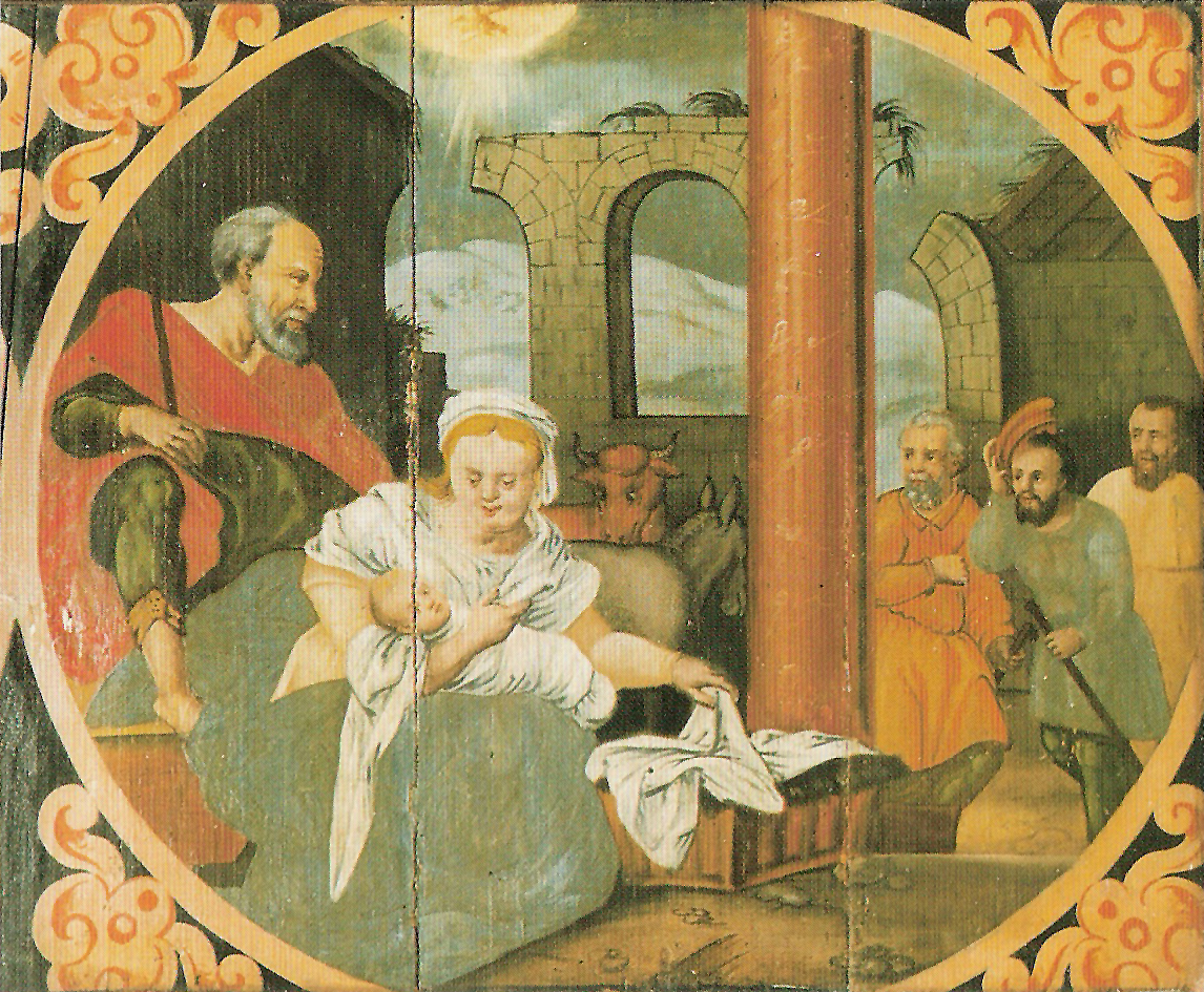 Geburt Jesu 1